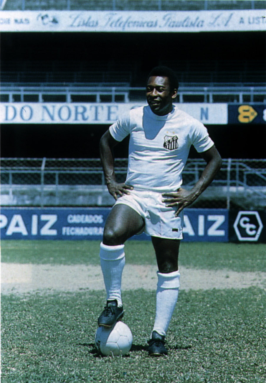 Pelé en session antes de la final contra Boca